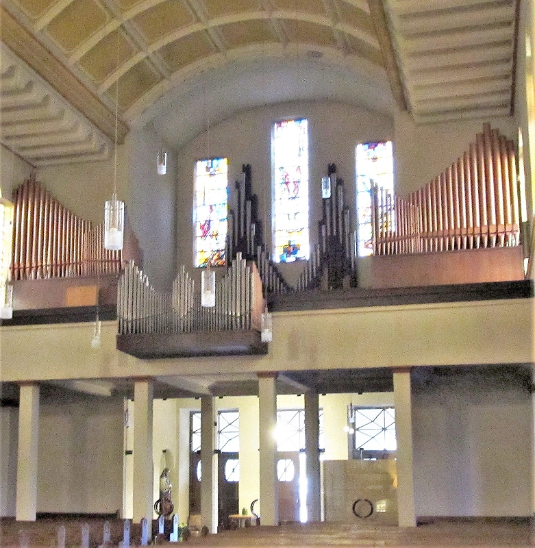 Blick ins Innere der katholischen Pfarrkirche St. Laurentius in Heiligenwald, einem Ortsteil der Gemeinde Schiffweiler, Landkreis Neunkirchen, Saarland